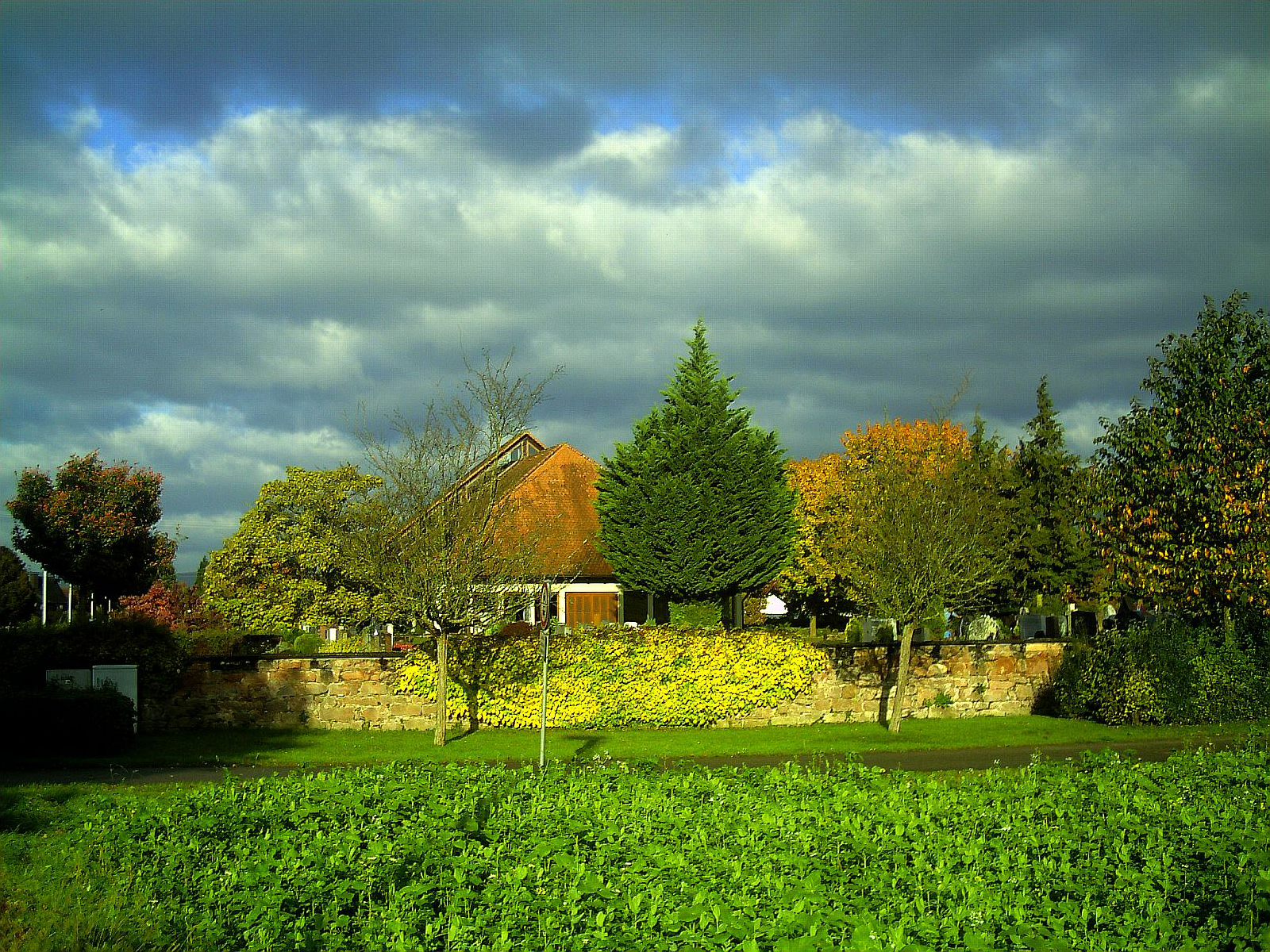 Autumn colors